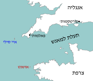 מפת תעלת למאנש